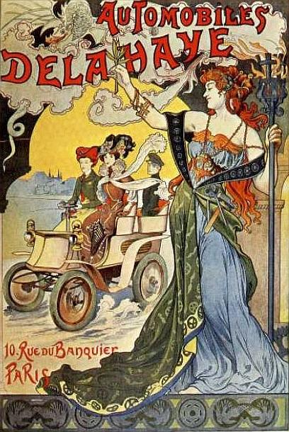 Automobiles Delahaye, 10 rue du banquier - Paris (1908, 128x94,5cm - Entoilée)